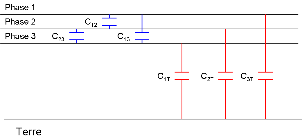 Représentation du comportement capacitif d'une ligne triphasé vis-à-vis du sol et mutuellement